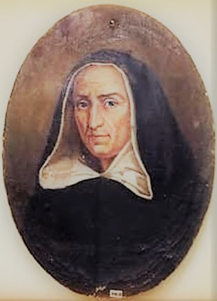 Tommaso Fazello (storico del 1500). Artista sconosciuto.